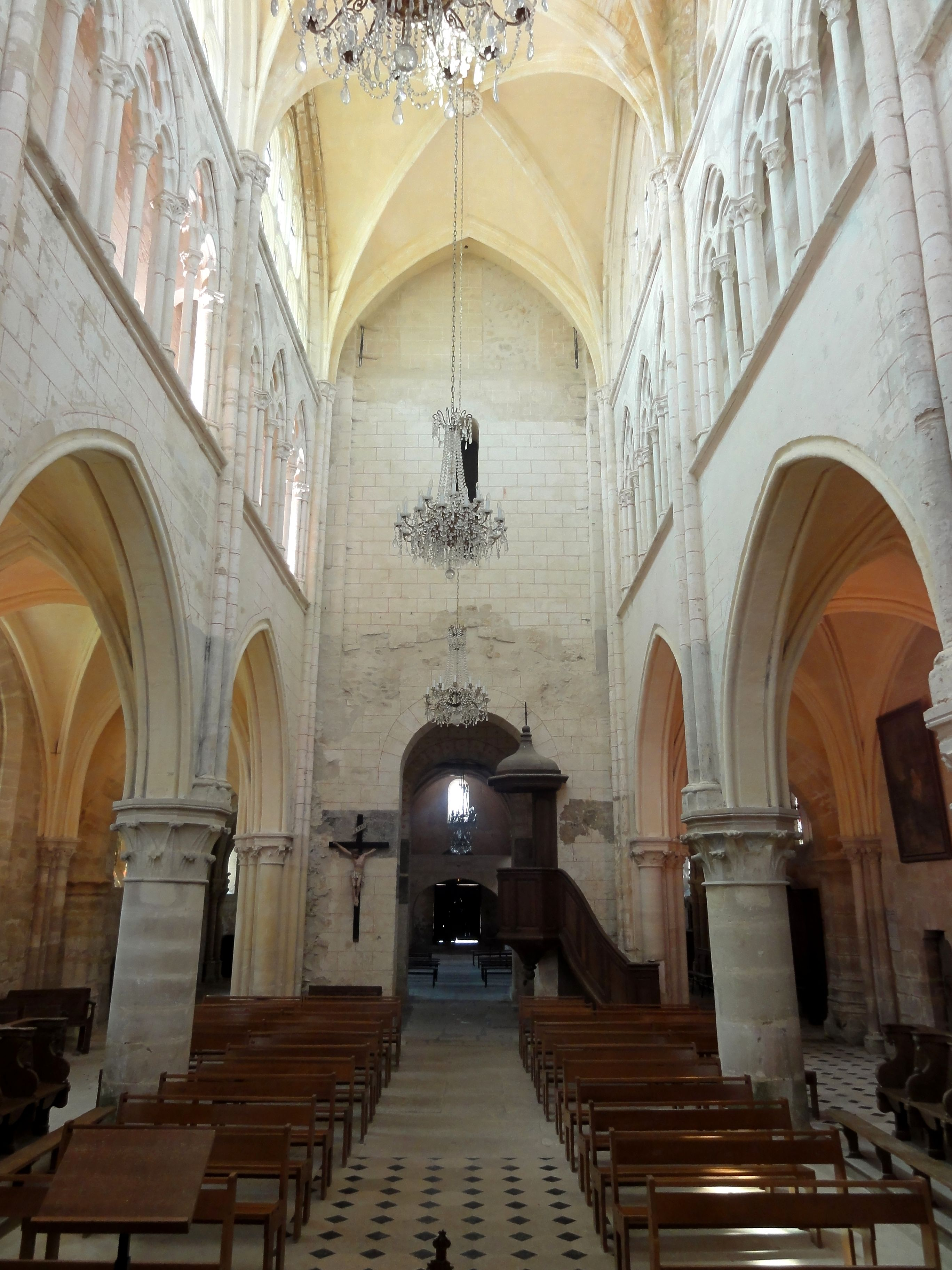 Chœur, vue vers l'ouest.